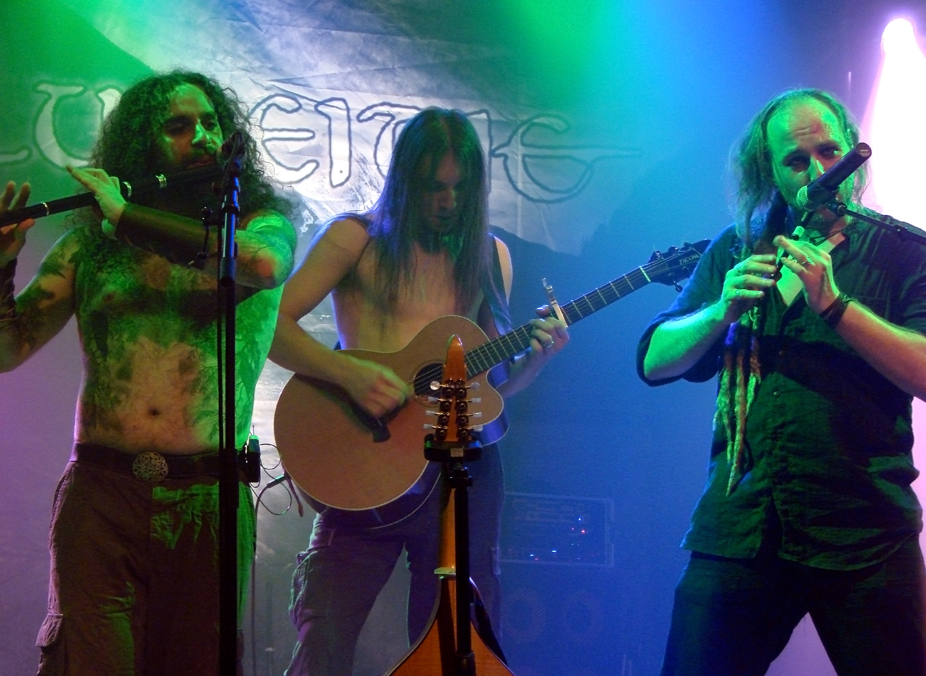 Eluveitie au Cernunnos Fest 07, le 16/12/07 à la Locomotive, Paris.